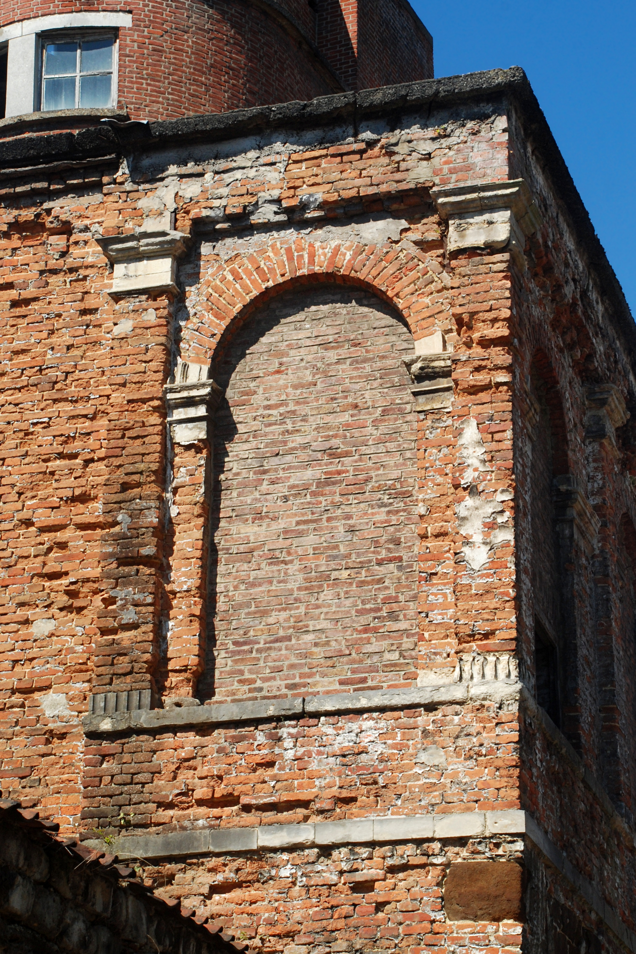 Belgique - Brabant flamand - Louvain - Première enceinte de Louvain - tour située sur le terrain des hôpitaux universitaires Saint-Pierre et Saint-Raphaël